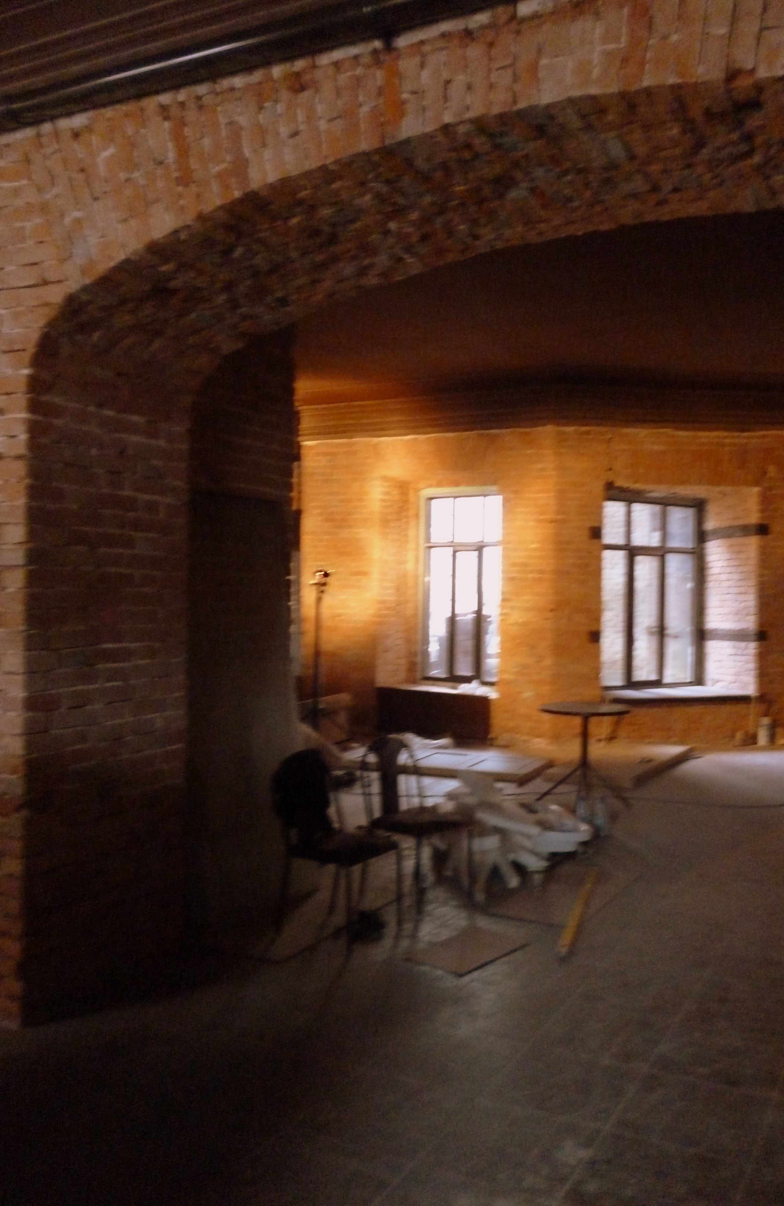 Ремонт в новом здании КДТ